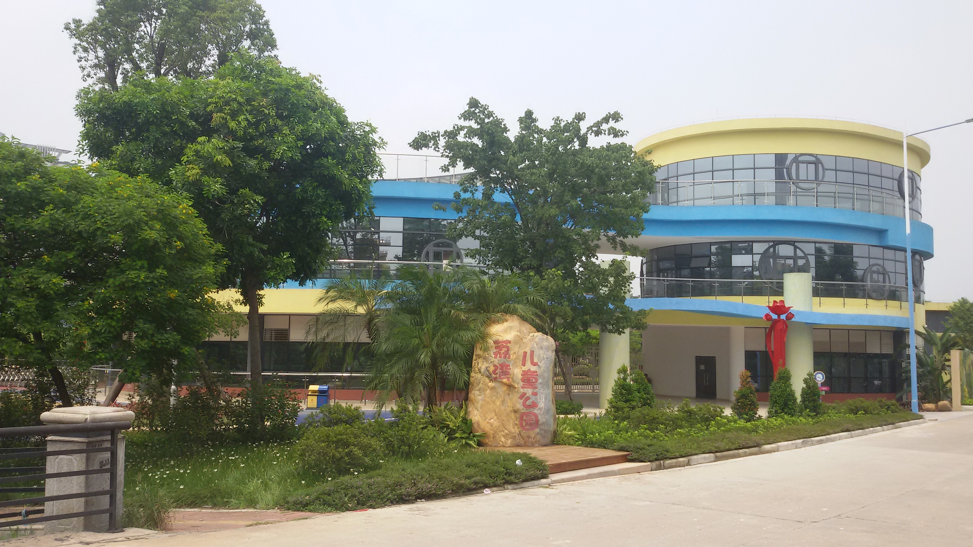 粵語: 荔灣兒童公園